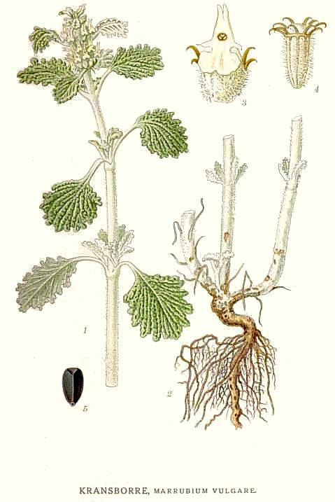 Original Description Kransborre, Marrubium vulgare L.